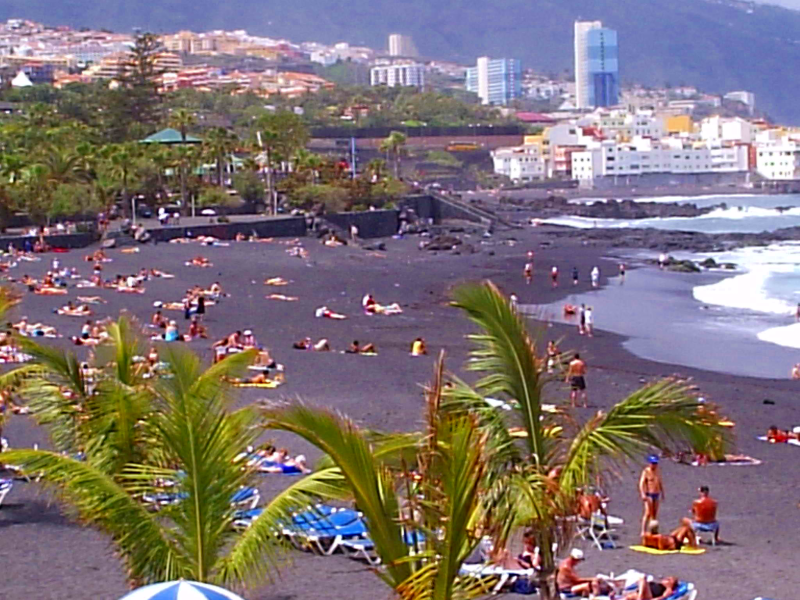 Playa Jardín en el Puerto de la Cruz, Tenerife, Islas Canarias, España. La foto ha sido hecha por mi.